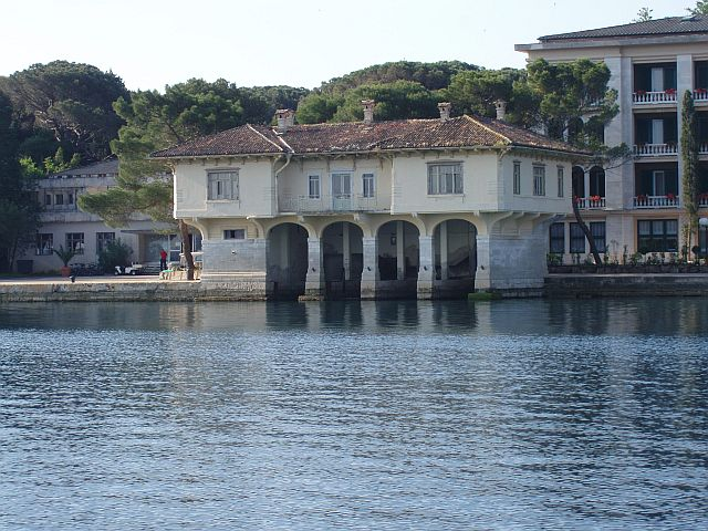 Brijuni, 28. maj 2006.